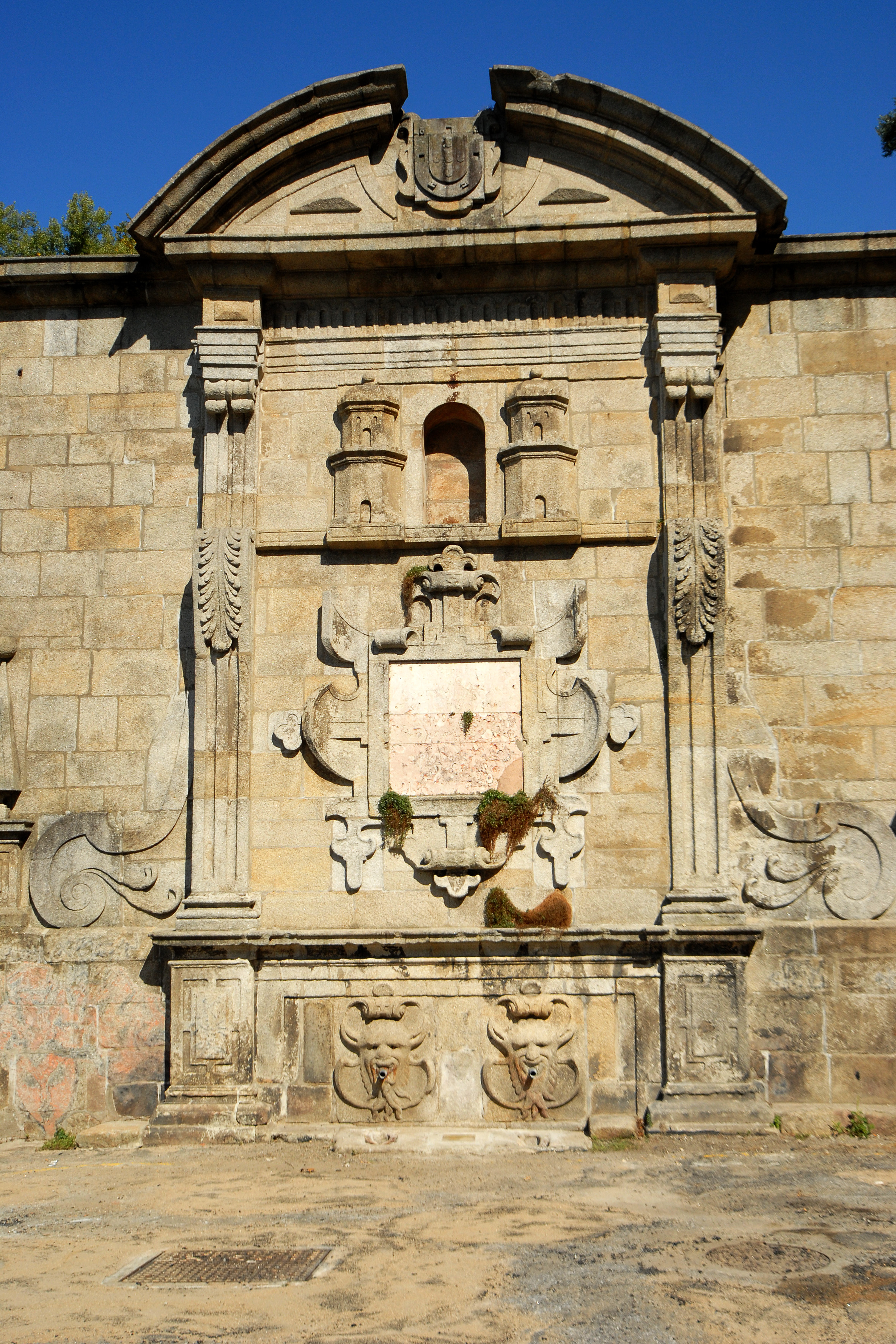 Chafariz das Virtudes - Pormenor This file was uploaded for Wiki Loves Monuments in Portugal with the unique identifier 70202.